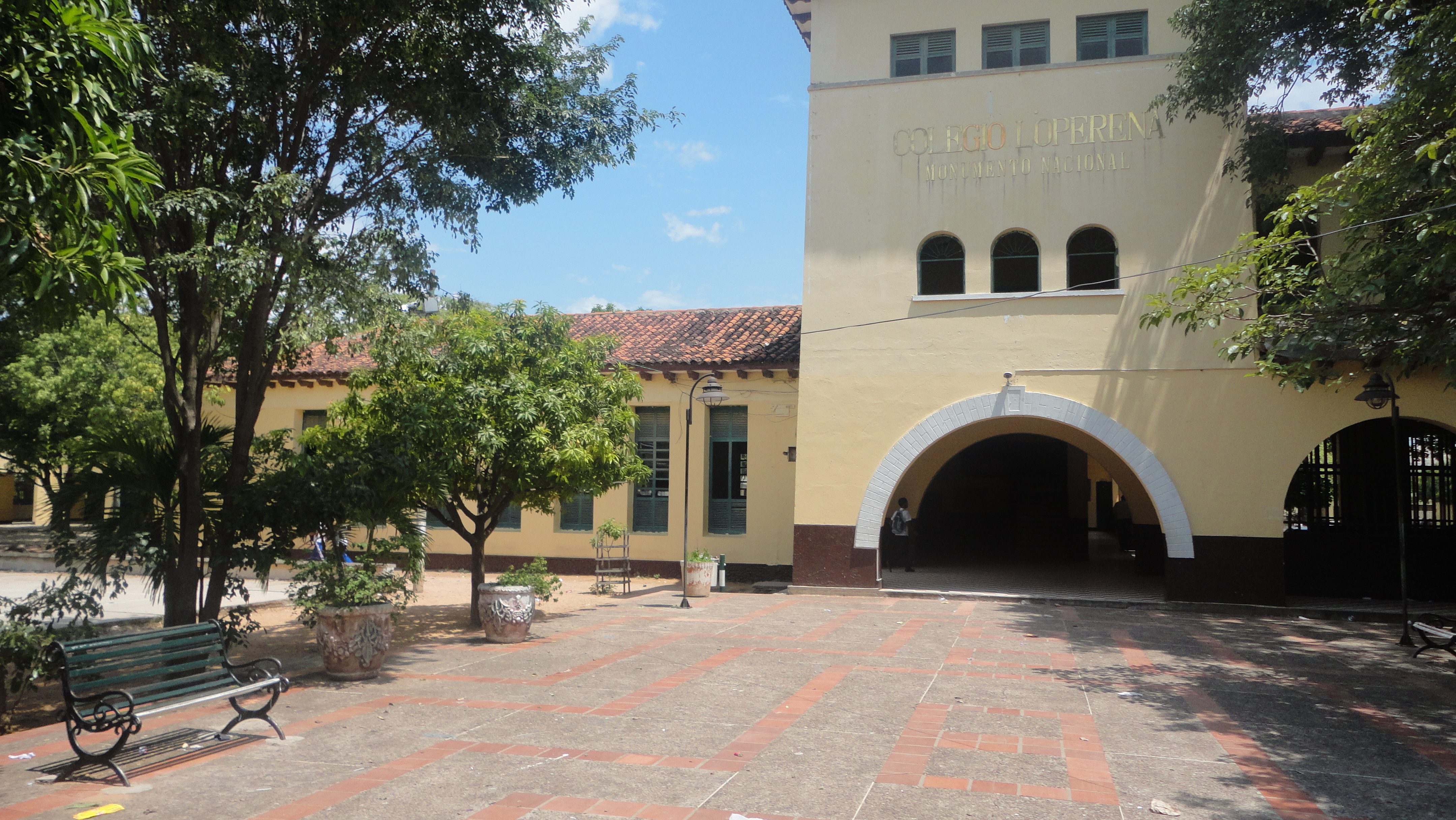 Colegio Nacional Loperena Central